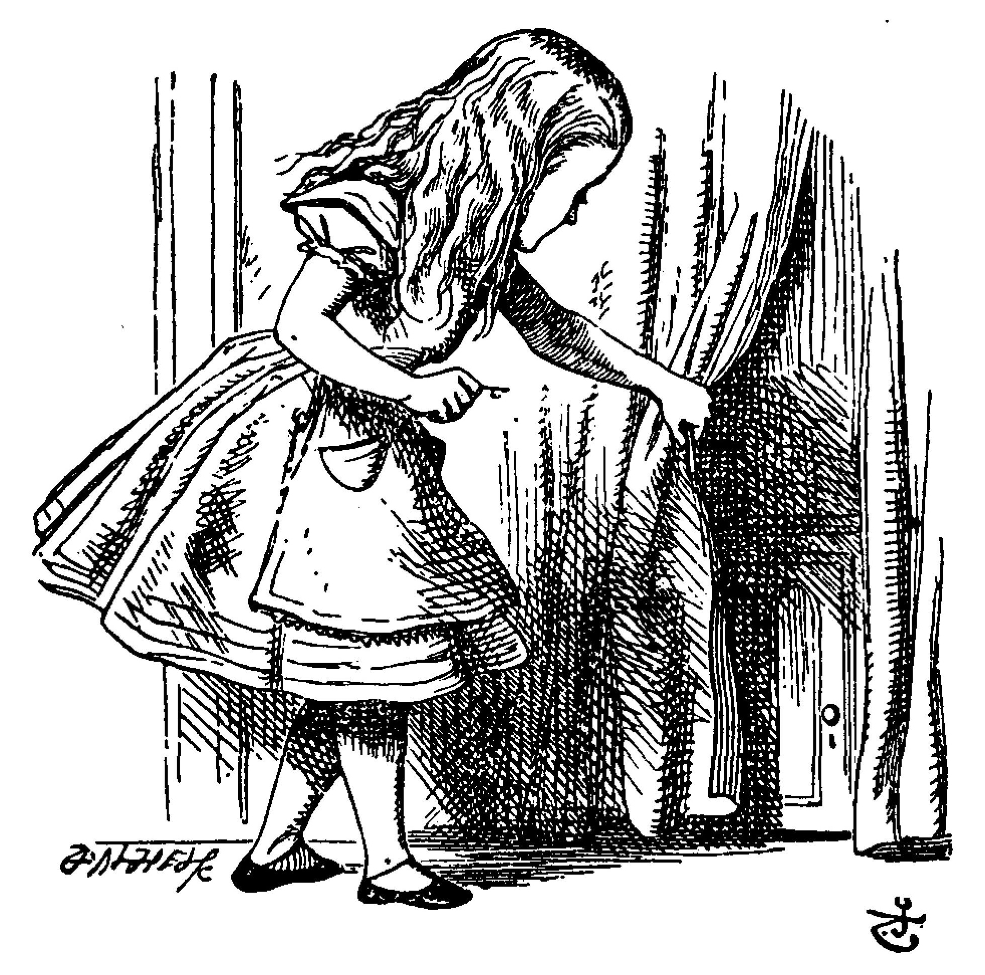 Alice’s Abenteuer im Wunderland Übersetzer: Antonie Zimmermann Orginal Titel: Alice's Adventures in Wonderland Illustrationen: John Tenniel